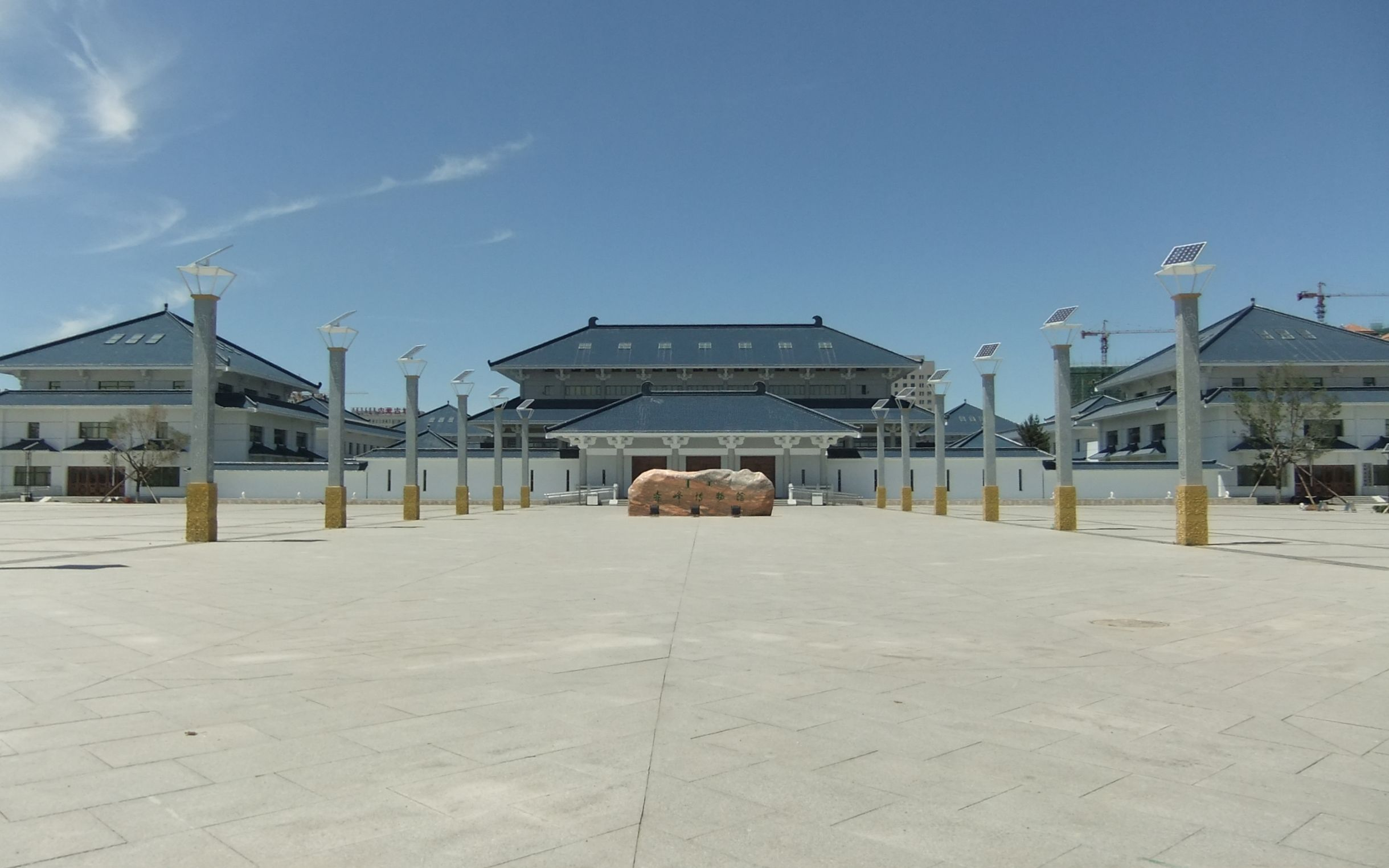 赤峰博物馆 - Chifeng Museum - 2011.06